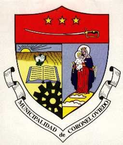 Escudo de la ciudad de Coronel Oviedo, Paraguay